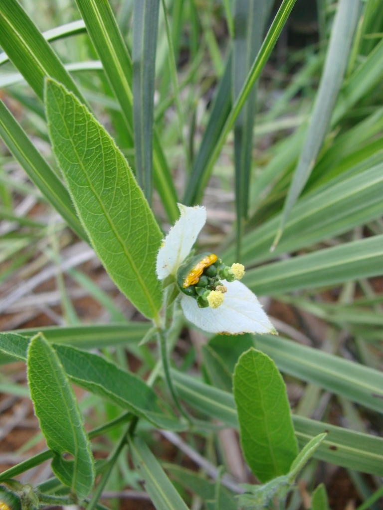 Dalechampia caperonioides - EUPHORBIACEAE Chapada Imperial - Brasília - Distrito Federal - Brasil.